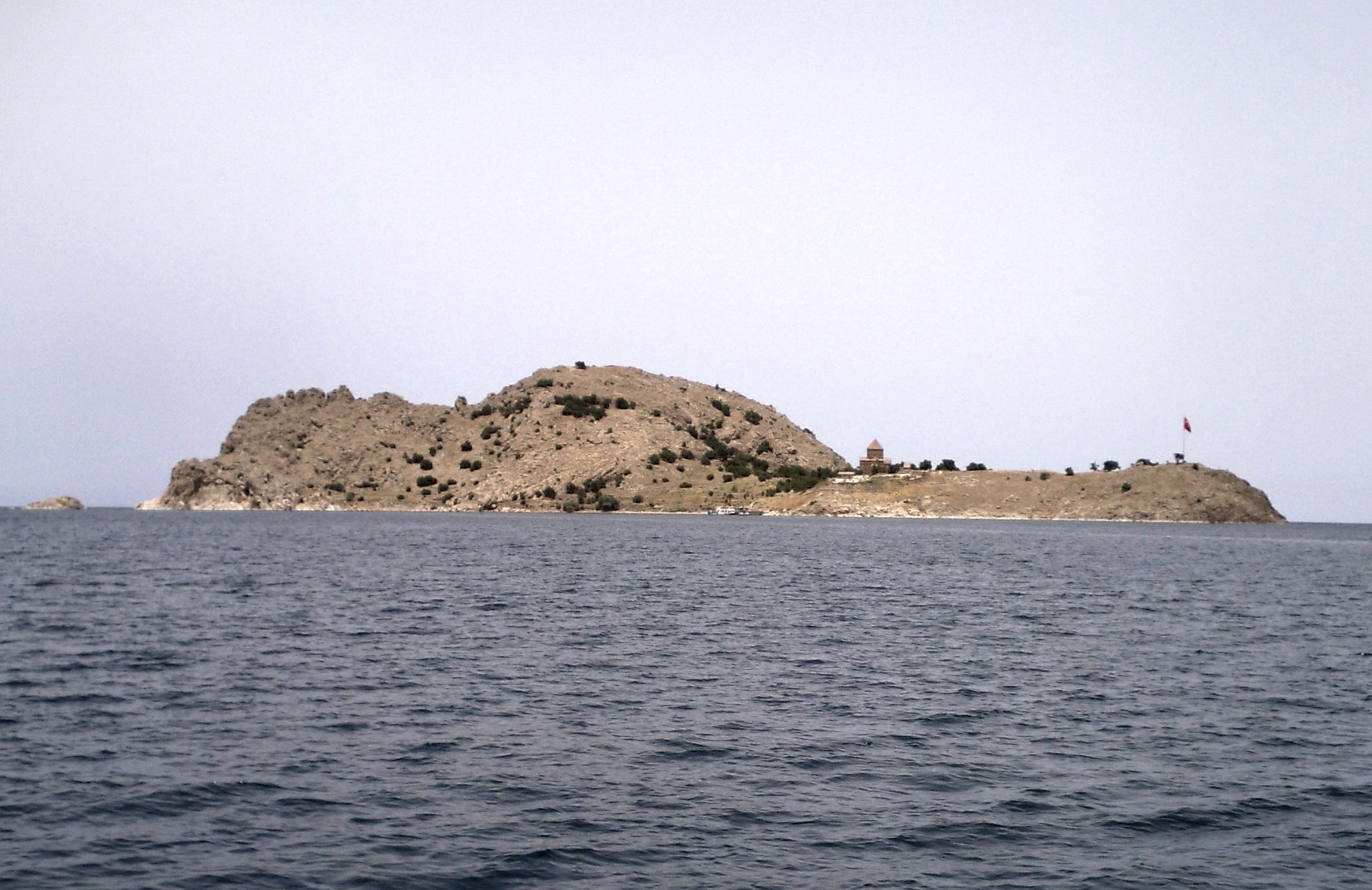 Akdamar Adası (Van, Türkiye)